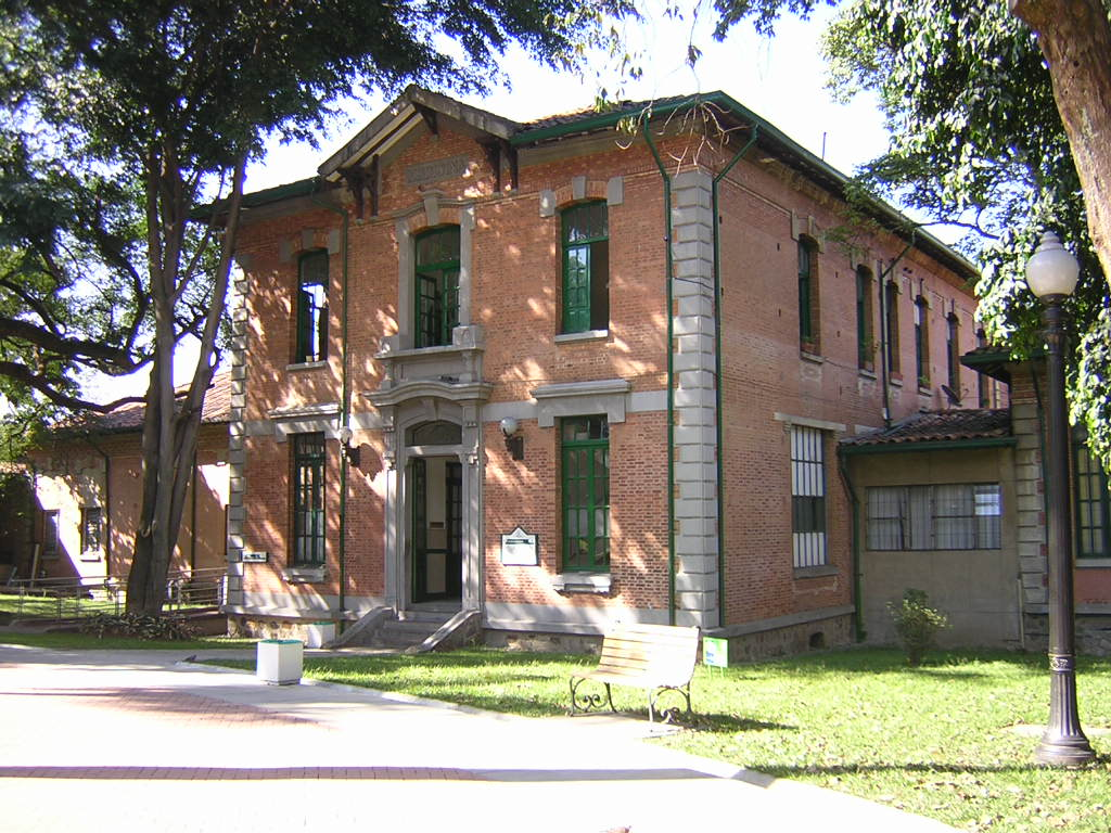 Bloque 5, Hospital Universitario San Vicente de Paúl, Medellín, Colombia (esta foto la tome yo, y la libero al dominio público)